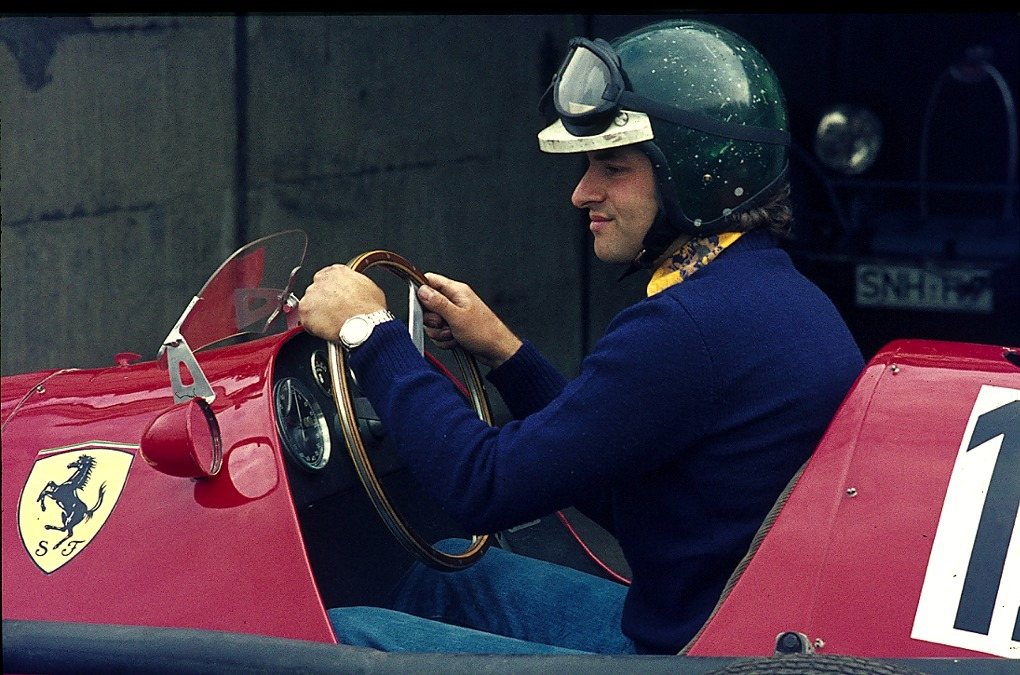 Bildbeschreibung: Alain de Cadenet im Ferrari F2/F1 von 1953 Fotograf: Lothar Spurzem Datum: 1975 im Fahrerlager des Nürburgrings